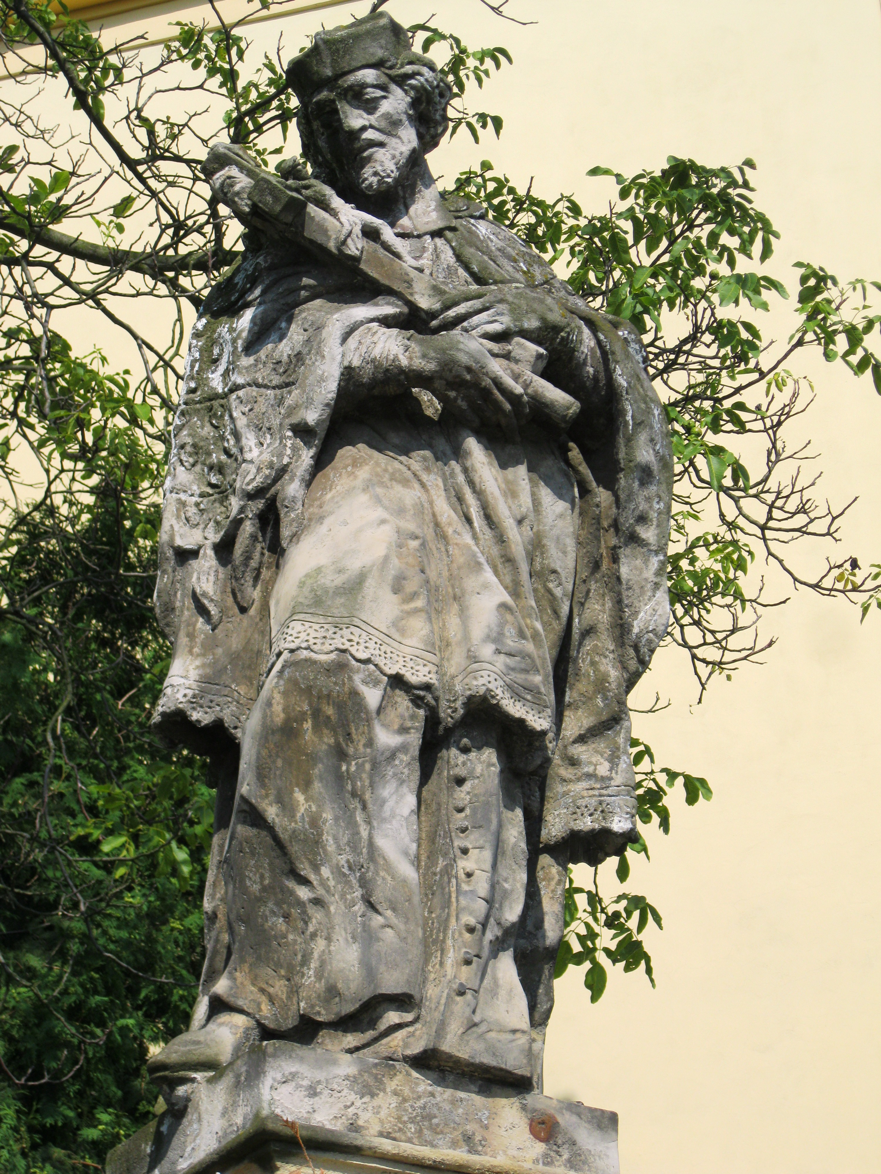 Socha sv. Jana Nepomuckého (Samotišky), křižovatka ulic Toveřská a Podhůry, předzahrádka školy, Samotišky